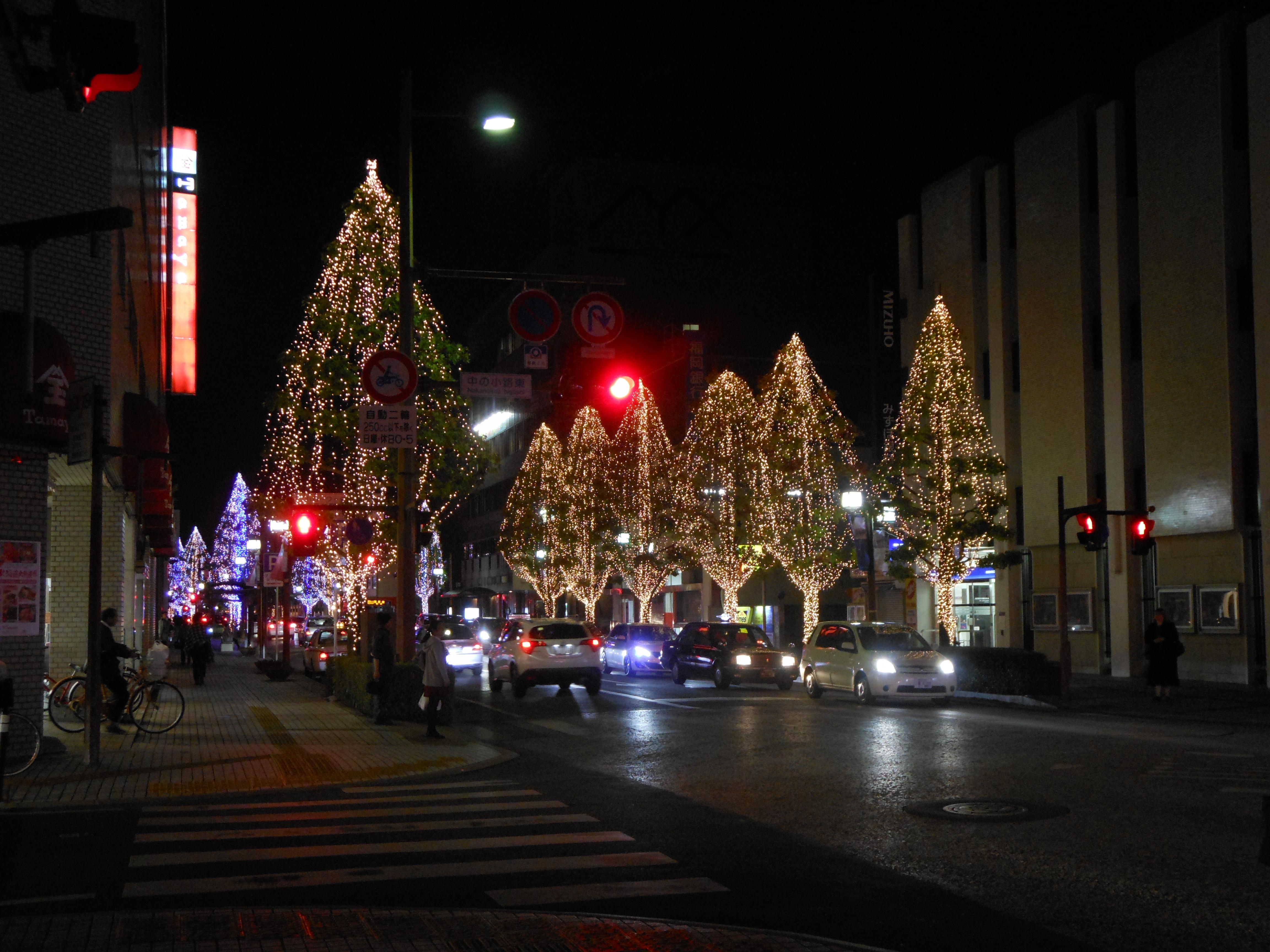 ライトアップイベント「サガ・ライトファンタジー」で電飾された佐賀県佐賀市の中央大通り、中の小路東交差点付近。